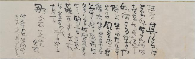 名倉彌一氏宛岡倉天心書簡(明治25年)